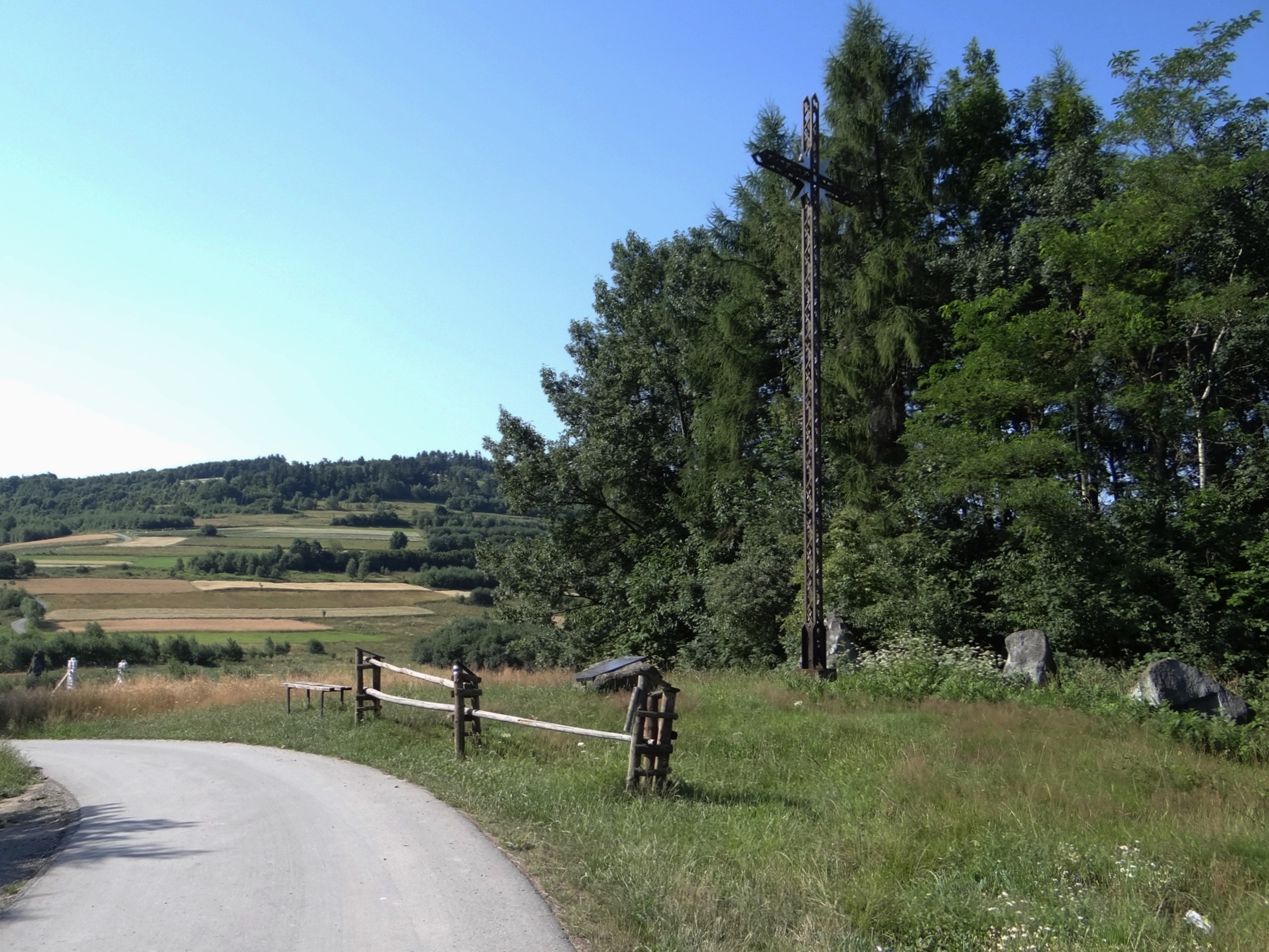 Przełęcz Sanguszki. Krzyż konfederatów barskich